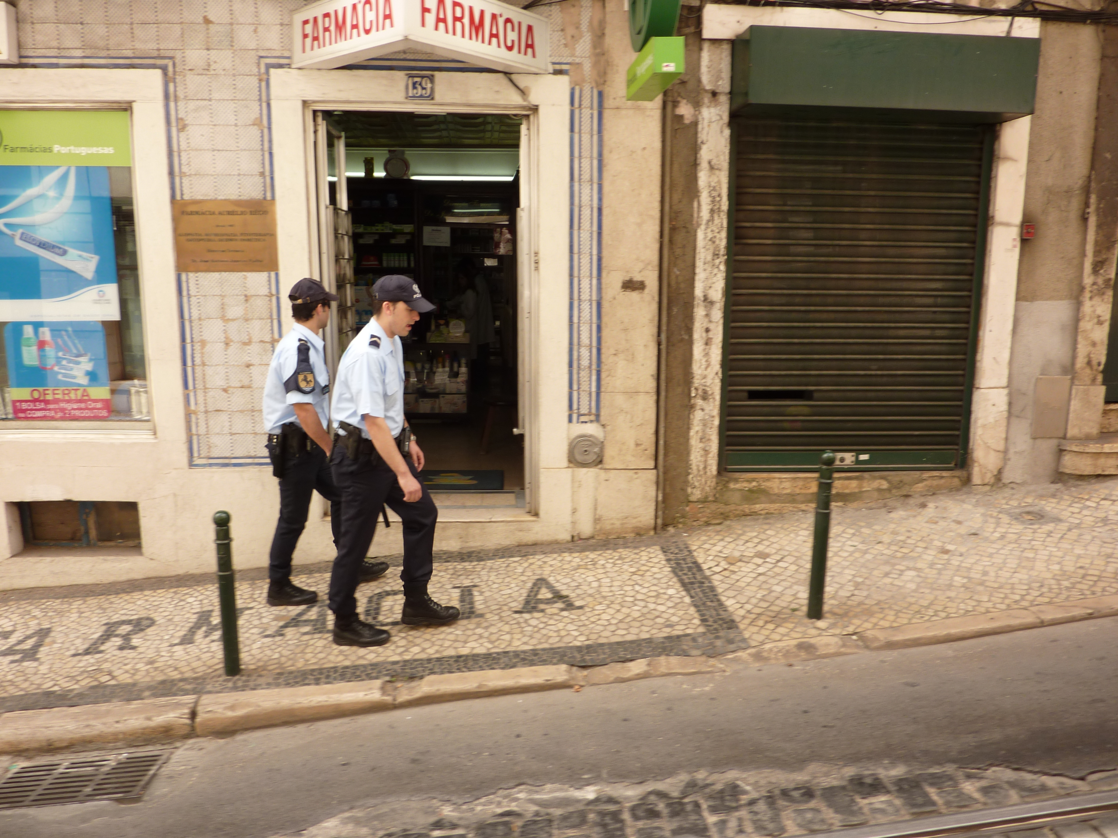 Du policanoj supreniras sur dekliva trotuaro.